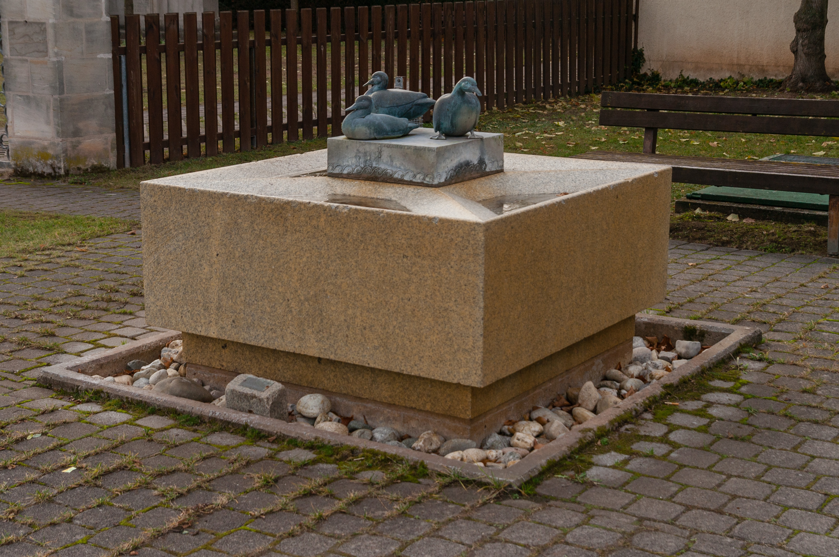 Feucht, Alter Freidhof, Entenbrunnen